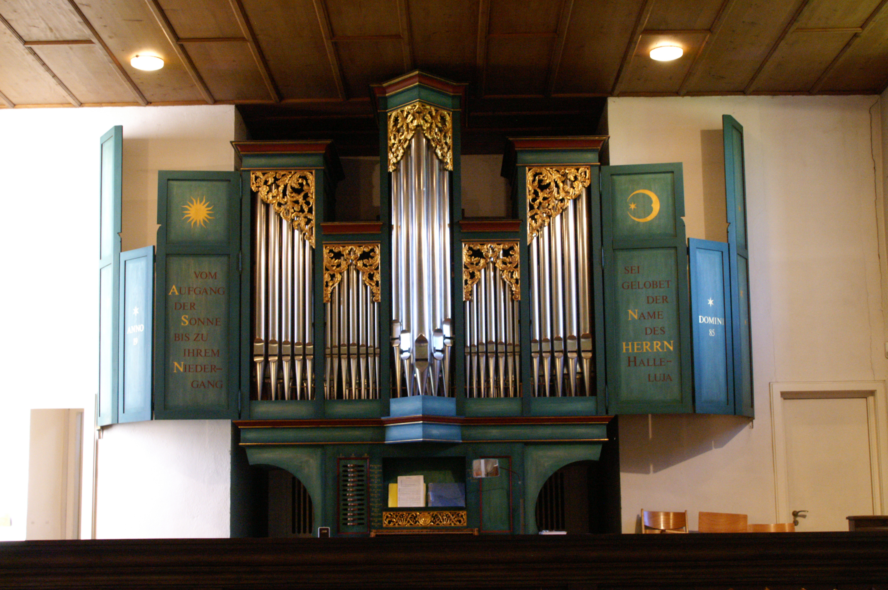 Orgel St. Martin (Stöckenburg) linker Flügel